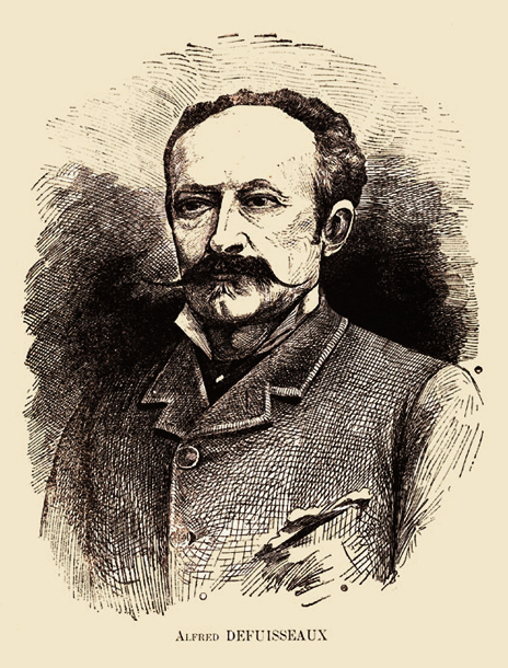 Alfred Defuisseaux (1843-1901), politicien belge membre du POB puis fondateur et président du PSR